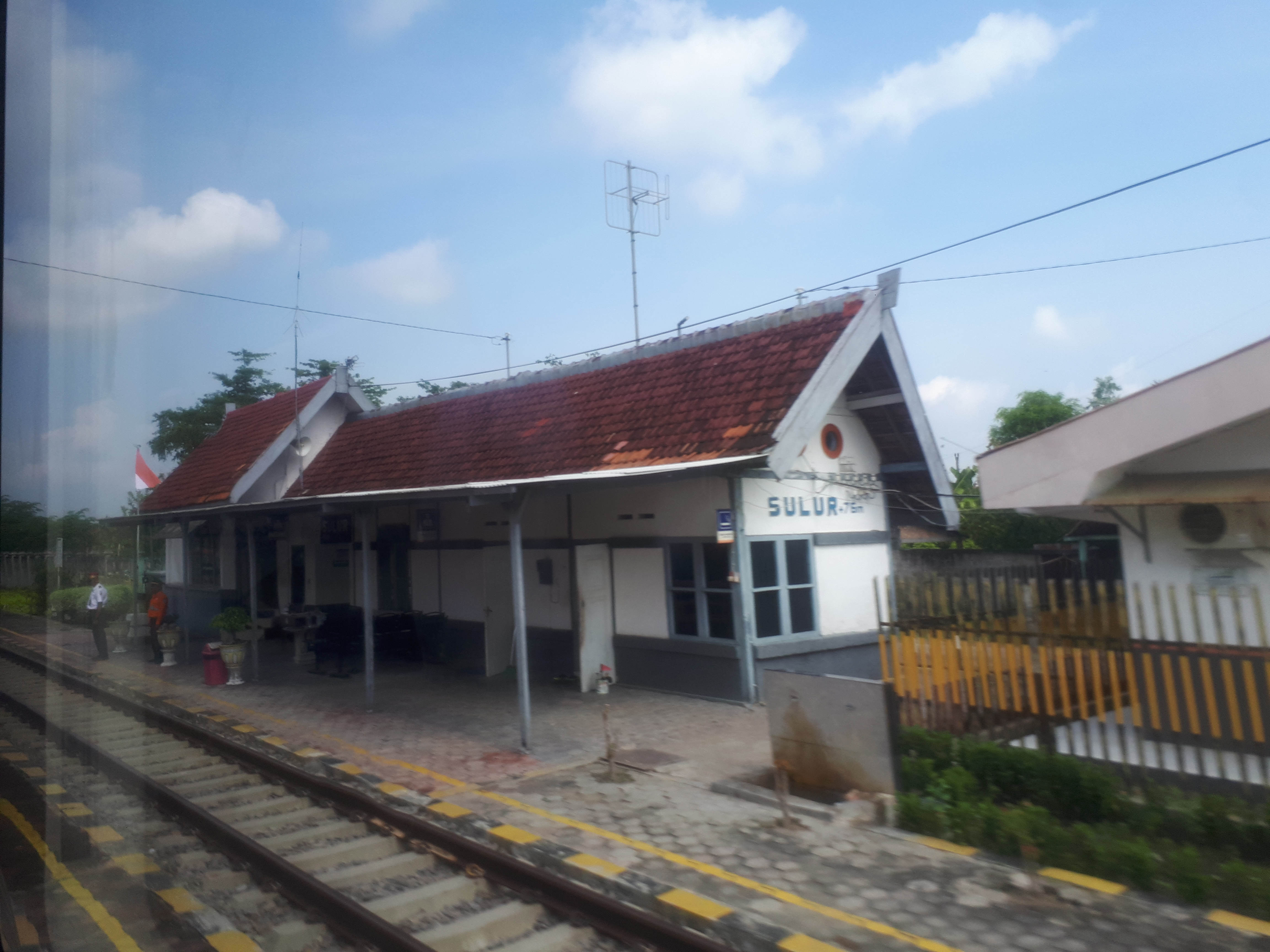 Stasiun Sulur tahun 2020